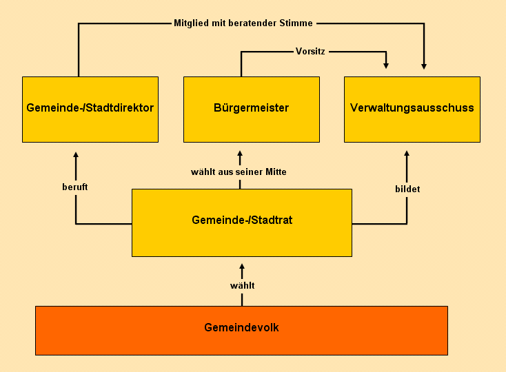 Aufbau der Verwaltungsstruktur einer Mitgliedsgemeinde einer niedersächsischen Samtgemeinde